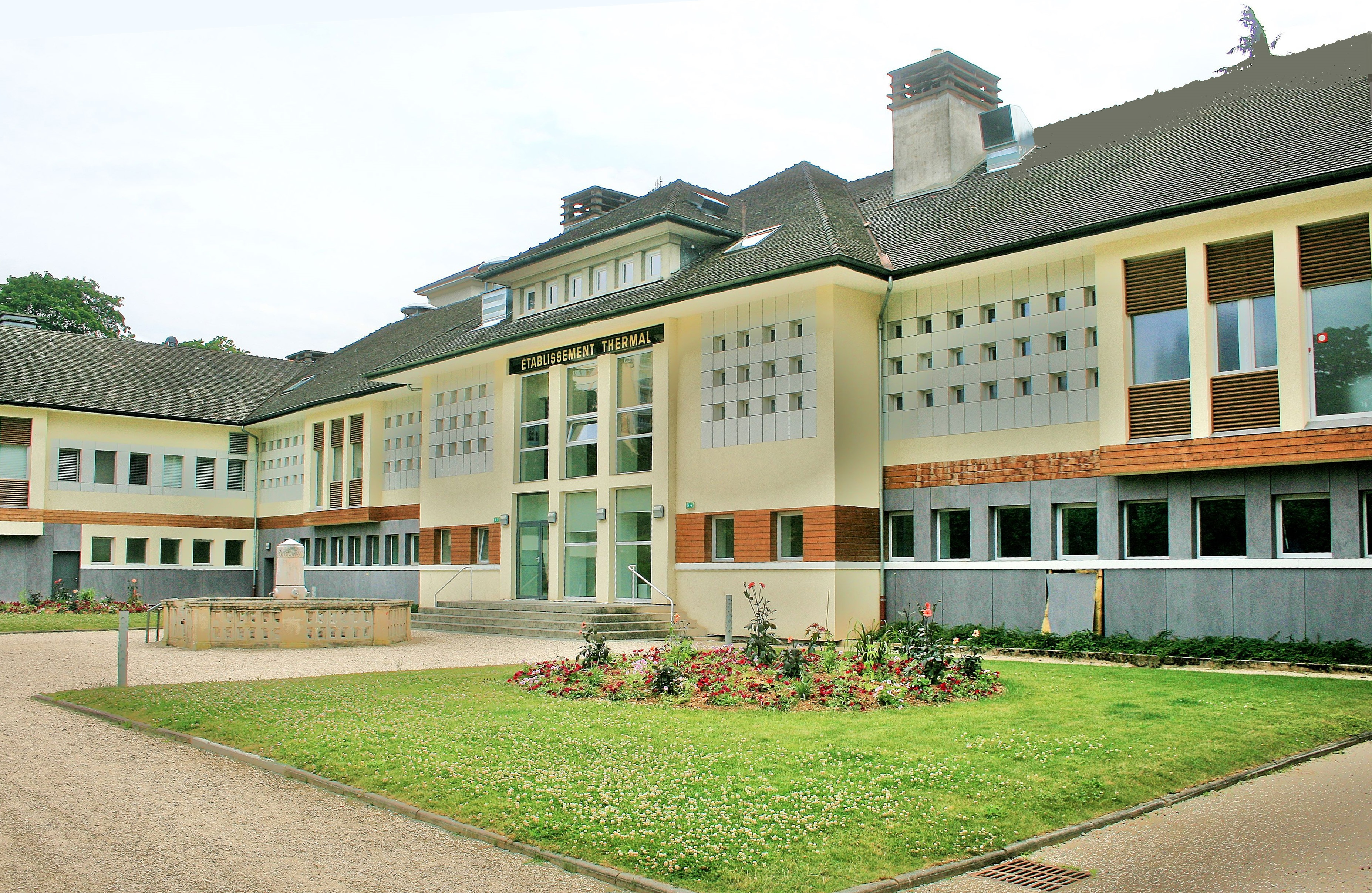 Etablissement thermal de Thonon-les-Bains.